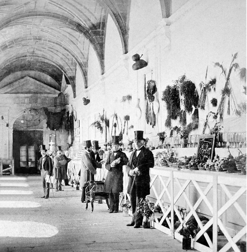 Exposición Rexional Galega de 1858